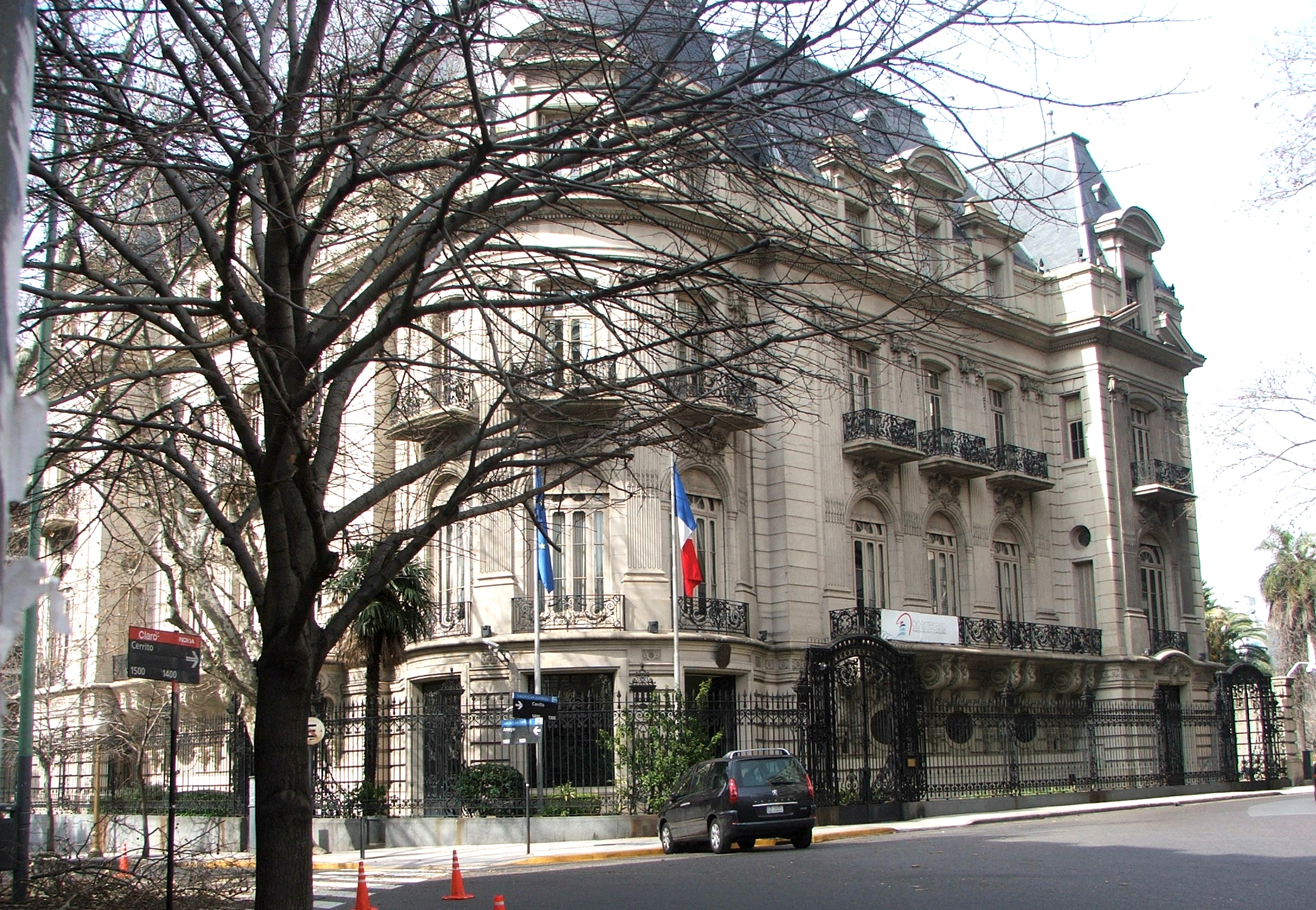 Residencia Ortiz Basualdo (Embajada de Francia)